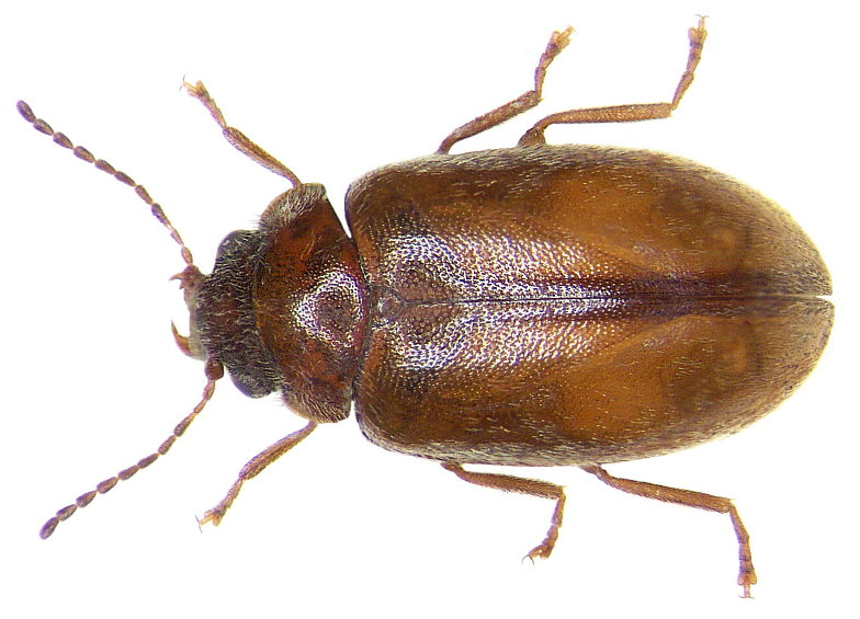 Familie: Scirtidae Grösse: 3-4,2 mm Verbreitung: Europa Ökologie: an eutrophen Gewässern der Ebene Fundort: Austria, Neusiedler See, Podersdorf leg.det. U.Schmidt, 1975 Foto: U.Schmidt, 2006